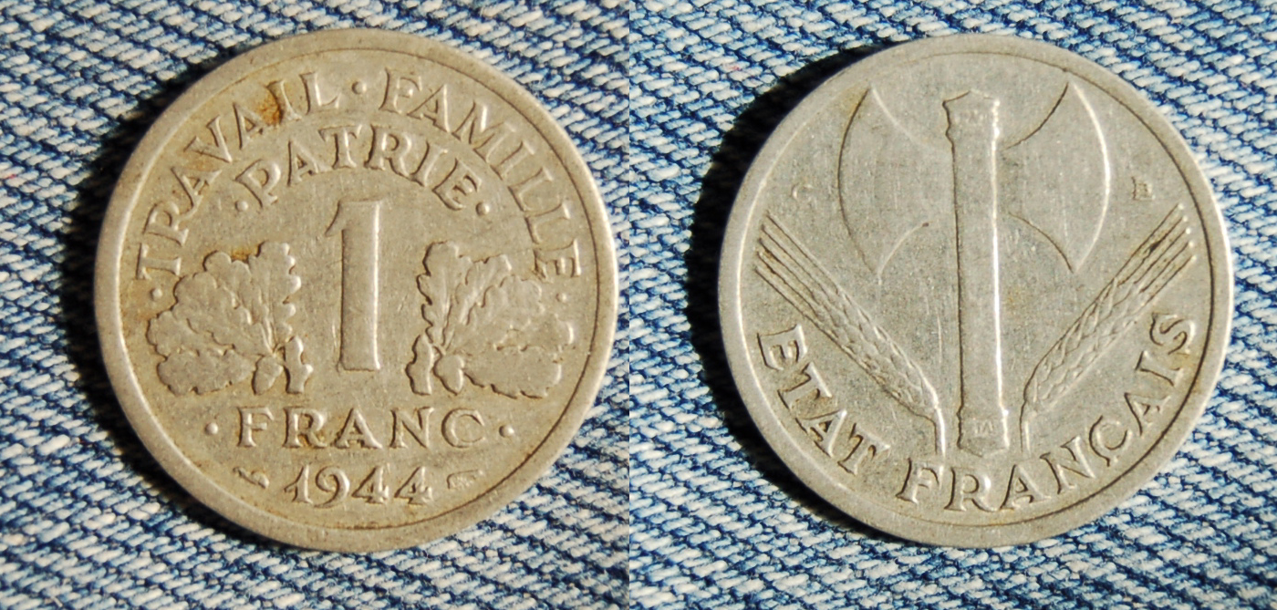 1 franc de 1944 - French coin